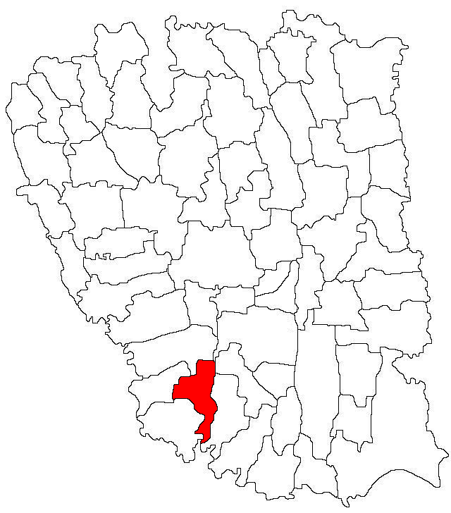 Categorie:Hărţi ale judeţului Galaţi